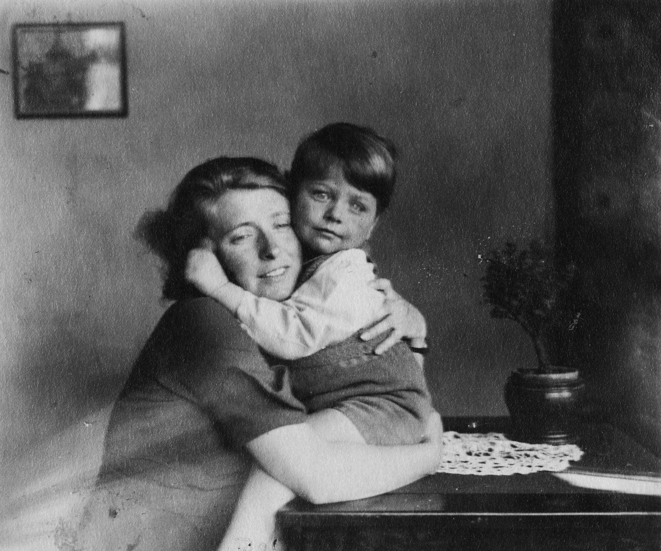 Irena Latinik-Vetulani z synem Jerzym Vetulanim. 1938